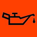 Témoin de pression d'huile moteur